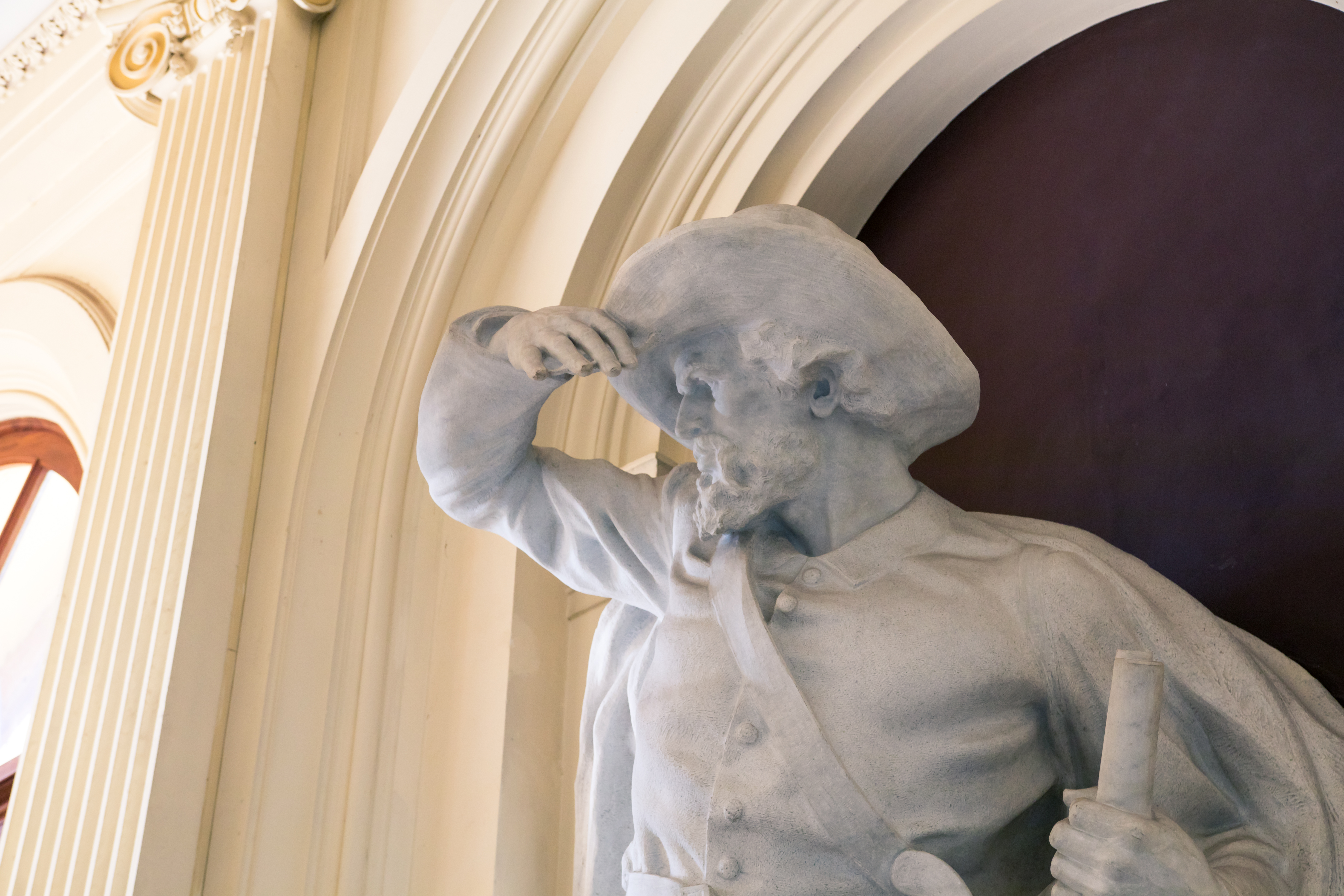 Museu Paulista em reforma